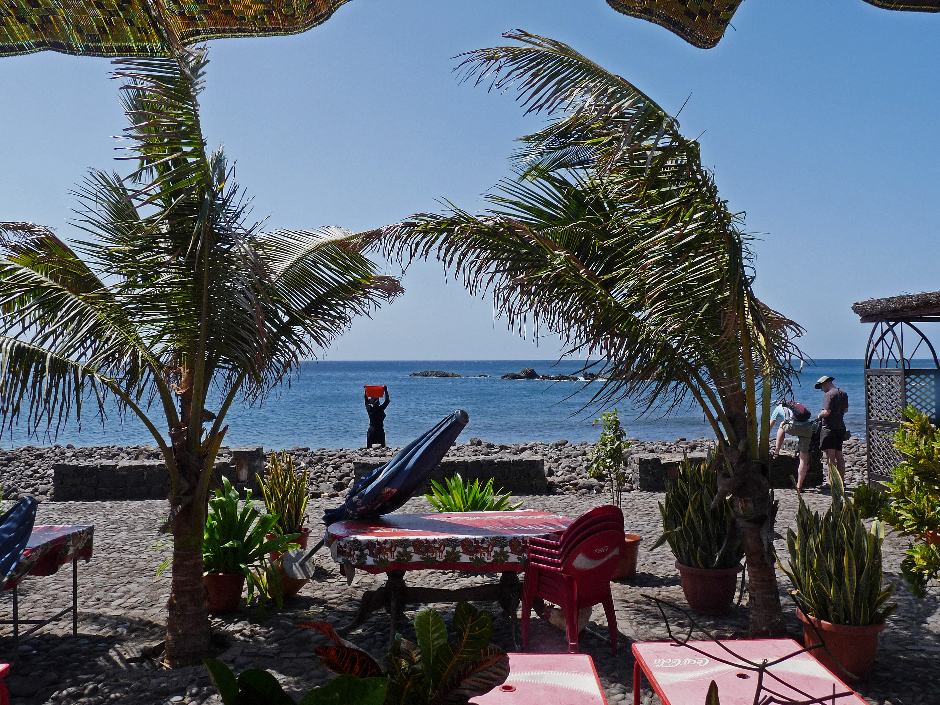 Cidade Velha (île de Santiago, Cap-Vert) : restaurant en bord de mer